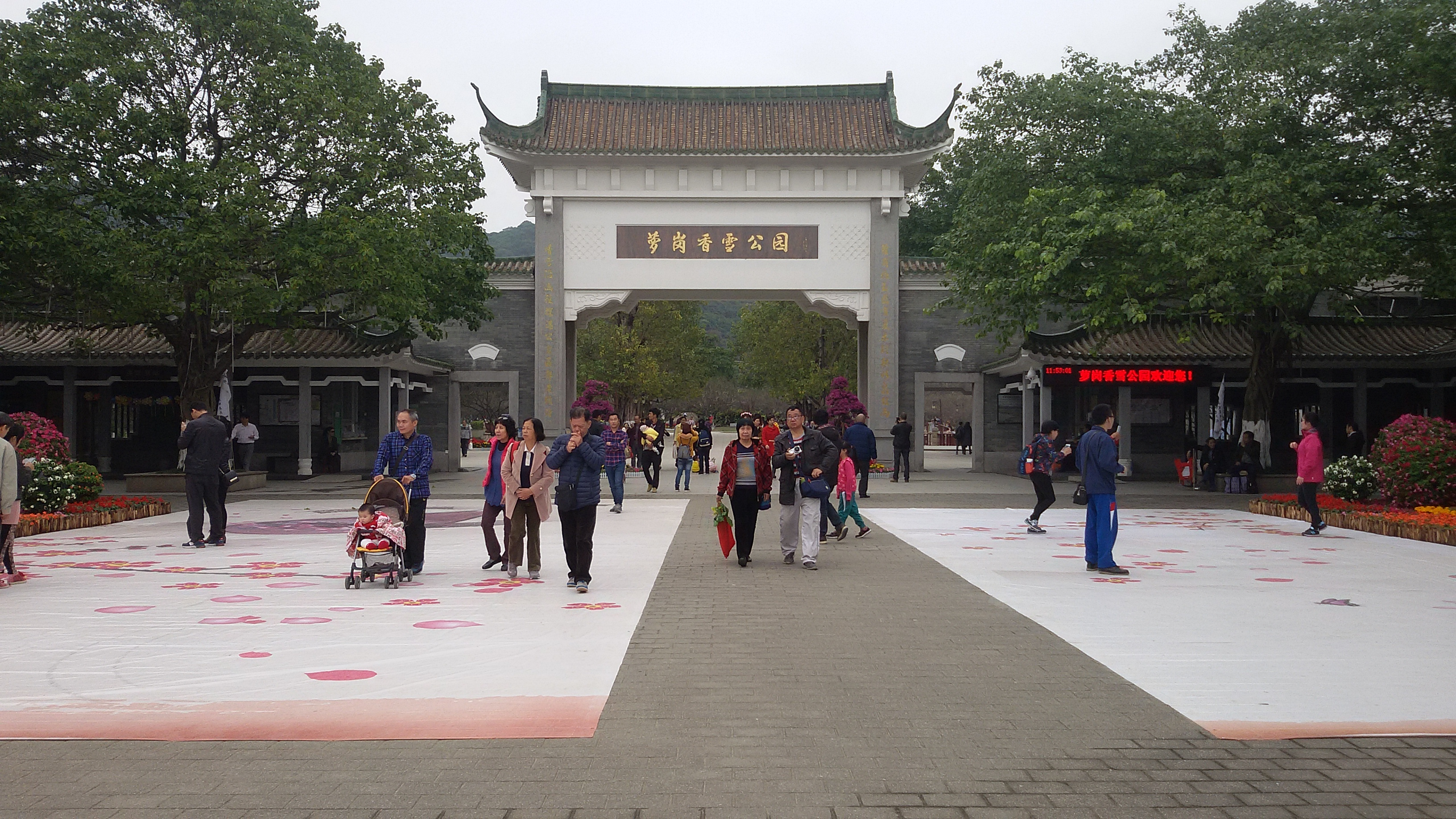 粵語: 蘿崗香雪公園正門